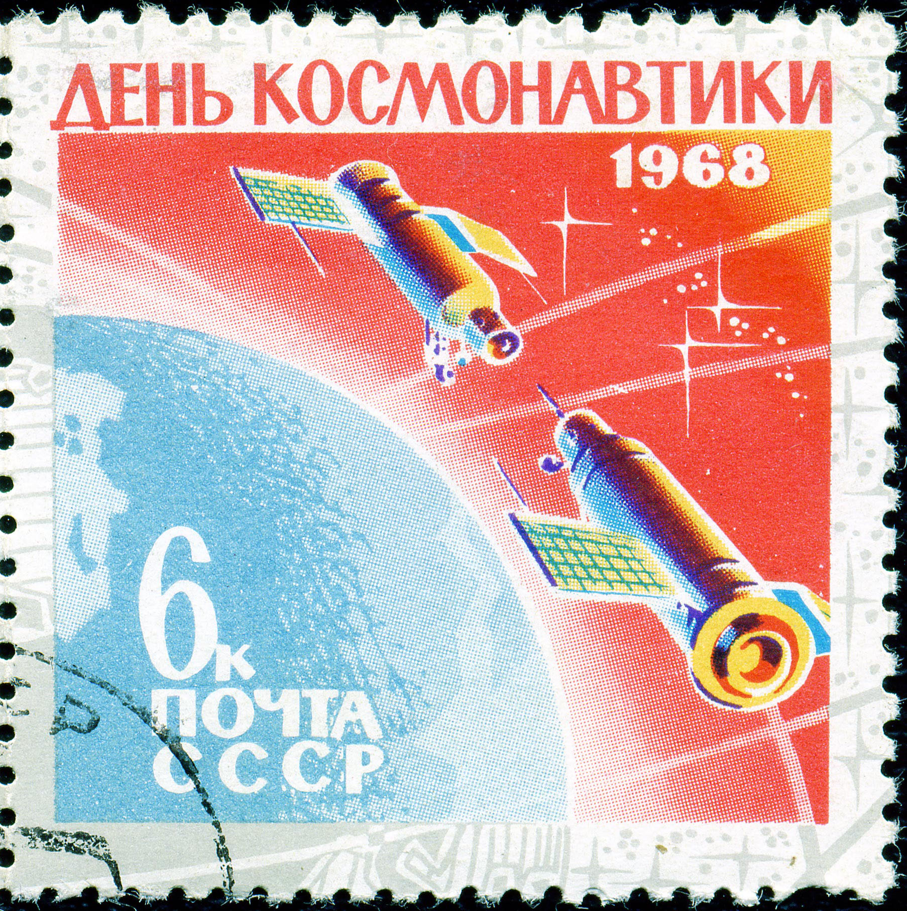 Почтовая марка СССР. 1968. День космонавтики. Стыковка ИСЗ «Космос-186» и «Космос-188» в автоматическом режиме 30 октября 1967 года. Номер по каталогу ЦФА 3623.